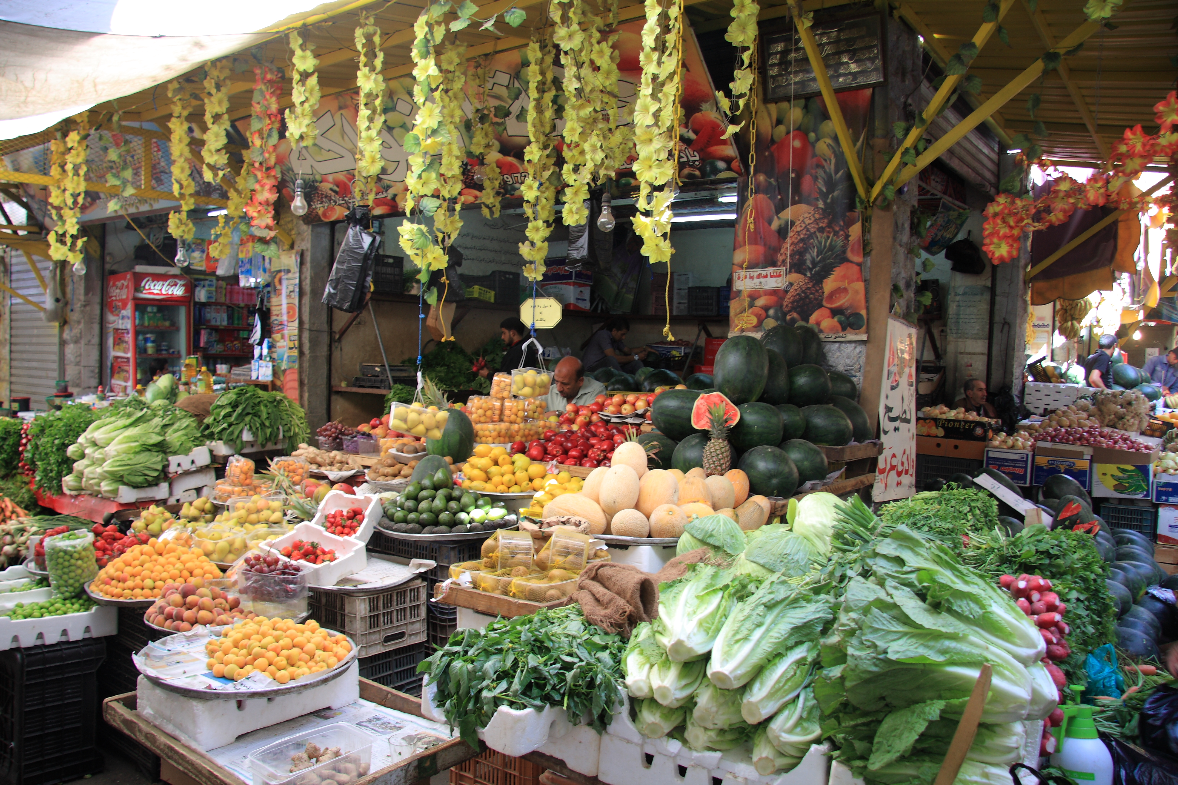 Le quartier commercial d'Amman bien achalandé